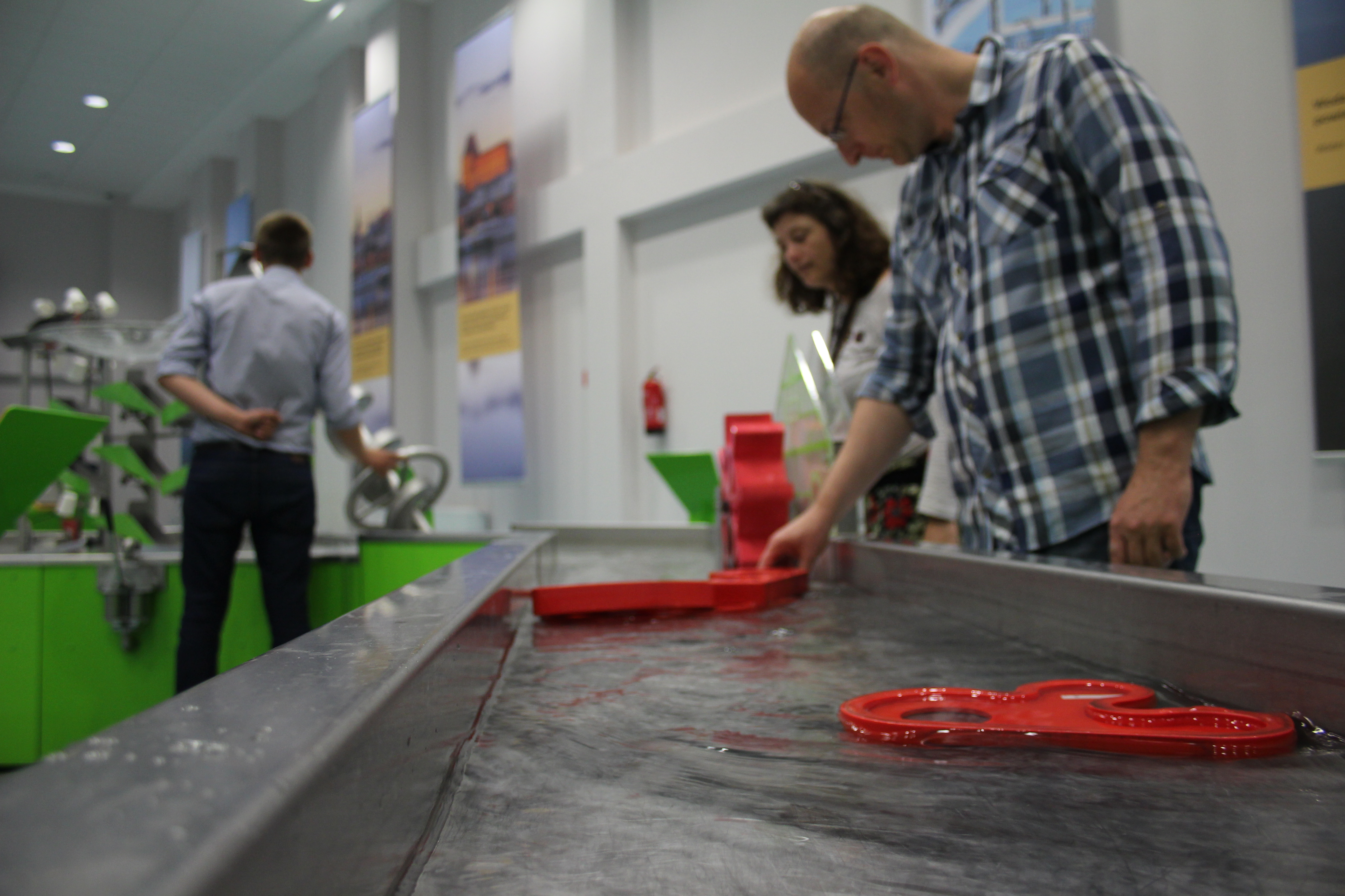 Wystawa stała "Rzeka"